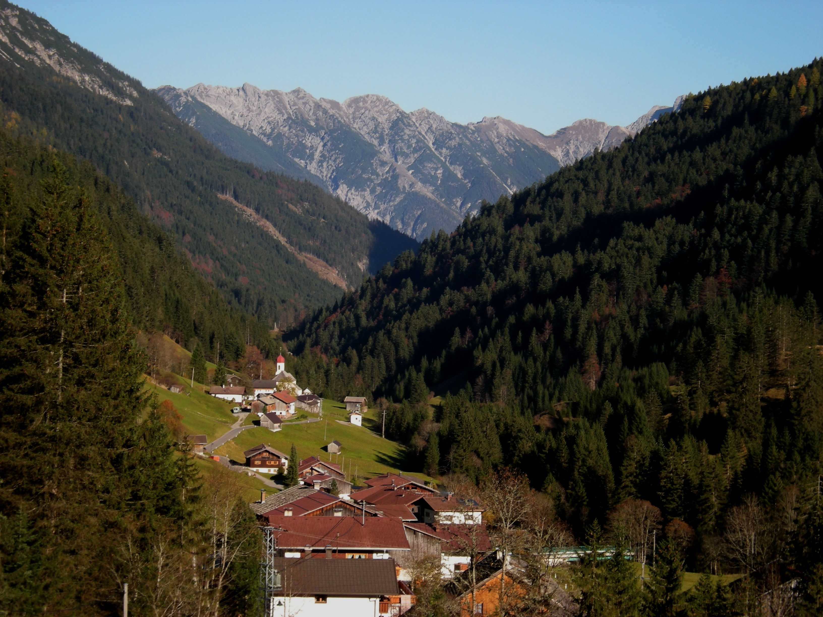 Hinterhornbach im Hornbachtal